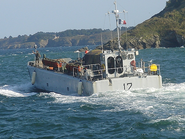 Barges de débarquement d'un régiment d'infanterie de marine doublant la poine de Ramonette Le Palais (56)